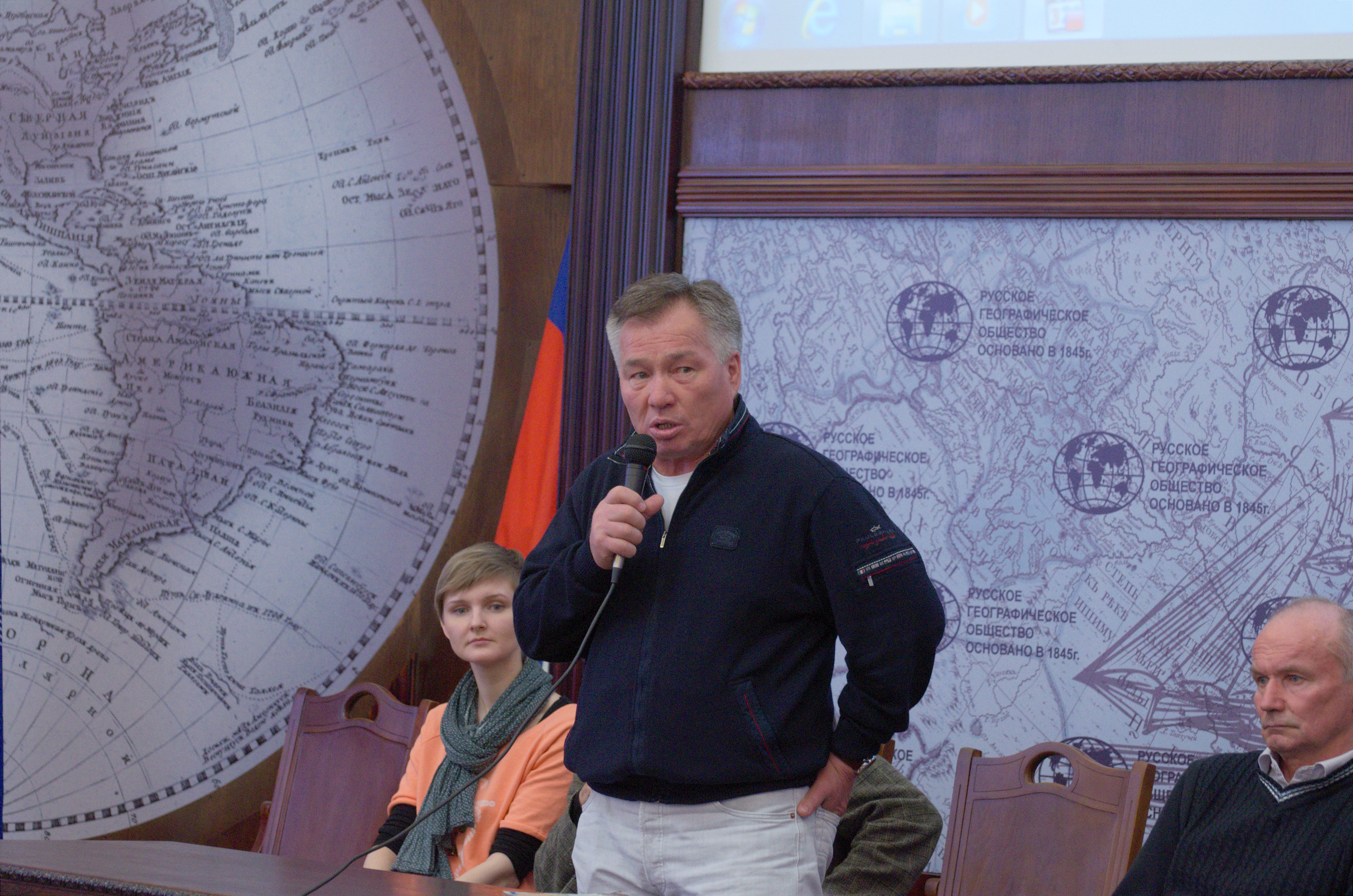 Валиев, Казбек Шакимович в российском географическом обществе 25 апреля 2012 года на встрече посвященной 30 летию восхождения на эверест в 1982 году.